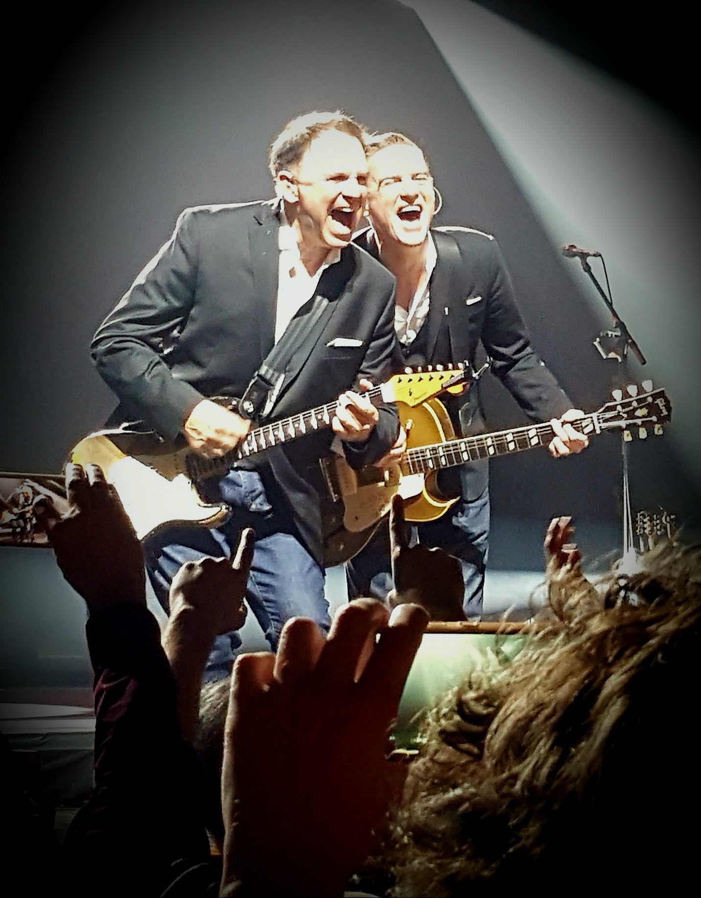 Bryan Adams Get Up Tour Rimini RDS stadium 15 novembre 2017